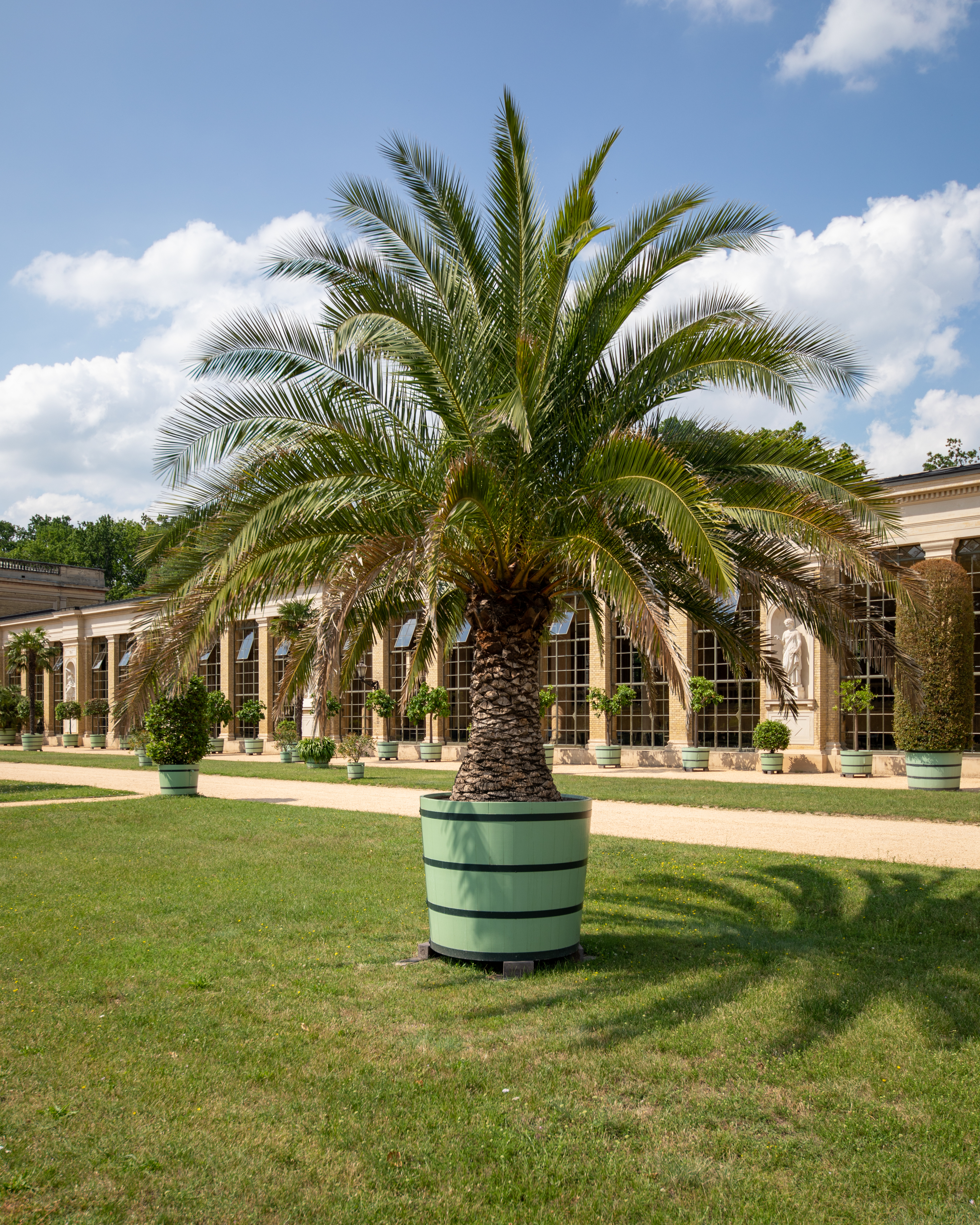 Potted palm tree in front of Orangerieschloss, Park Sanssouci, Potsdam 2019